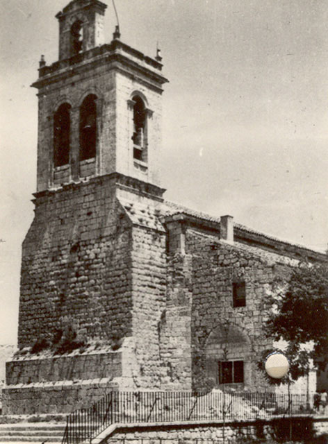 Iglesia parroquial de Nuestra Señora de la Asunción - Villanubla (Valladolid) - Colección de cromos álbum de Valladolid editado por la Caja de Ahorros Provincial en 1962. Iglesia Parroquial de Villanubla. El Obispo Marcelo González, prelado de Astorga en la epoca de la colección, es gloria local de Villanubla. - Fotografía 42 x 60 B/N